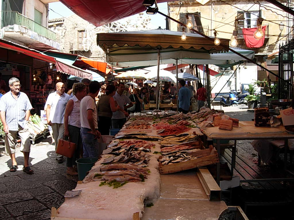 Mercato della Vucciria a Palermo Foto personale concessa in PD Quella riportata nella foto, è l'immagine di uno scorcio del mercato del Capo; altro mercato storico della città di Palermo e non già quello della Vucciria, come erroneamente riportato nella descrizione.